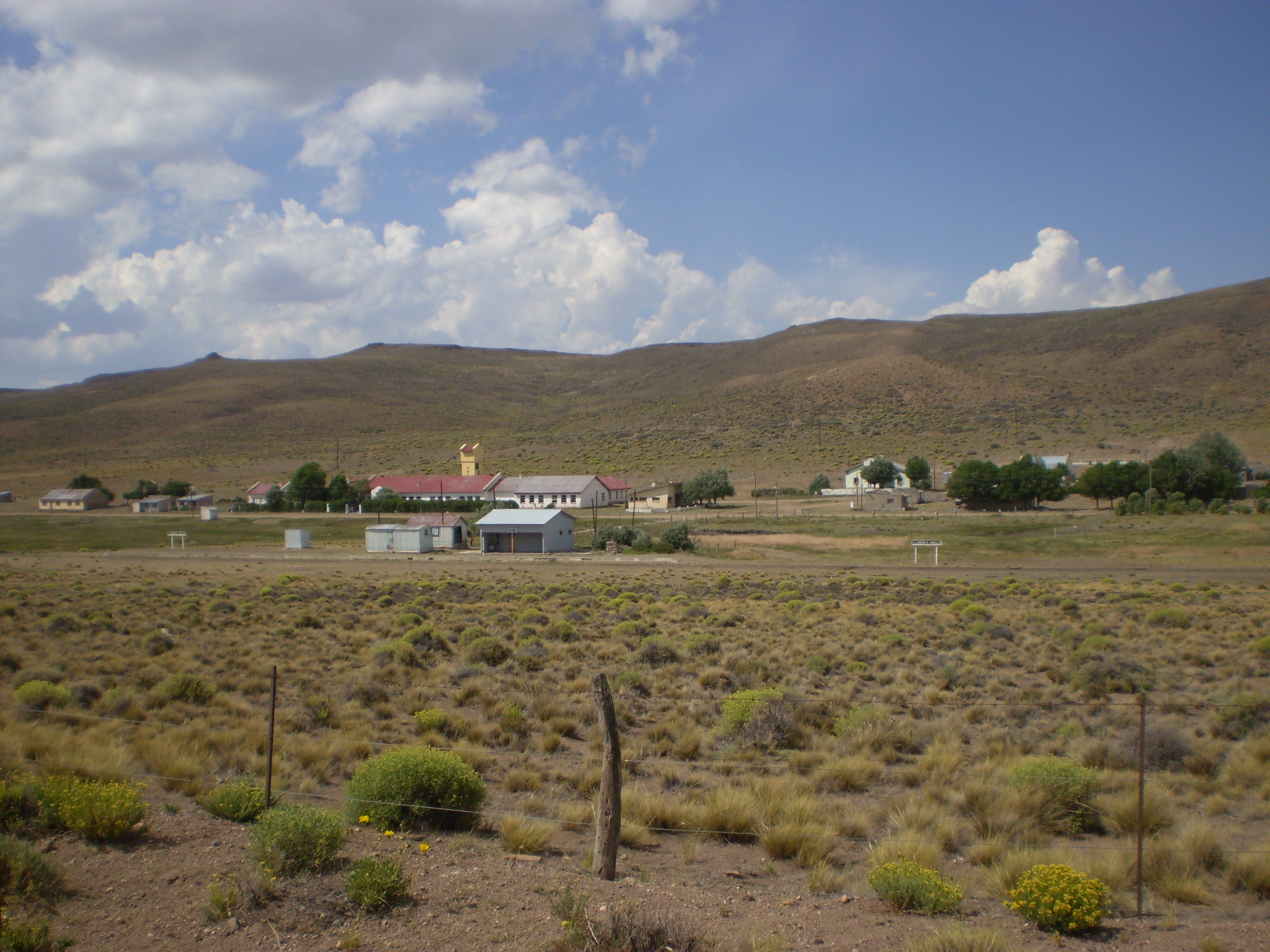 Paraje Clemente Onelli, Rio Negro, Argentina.